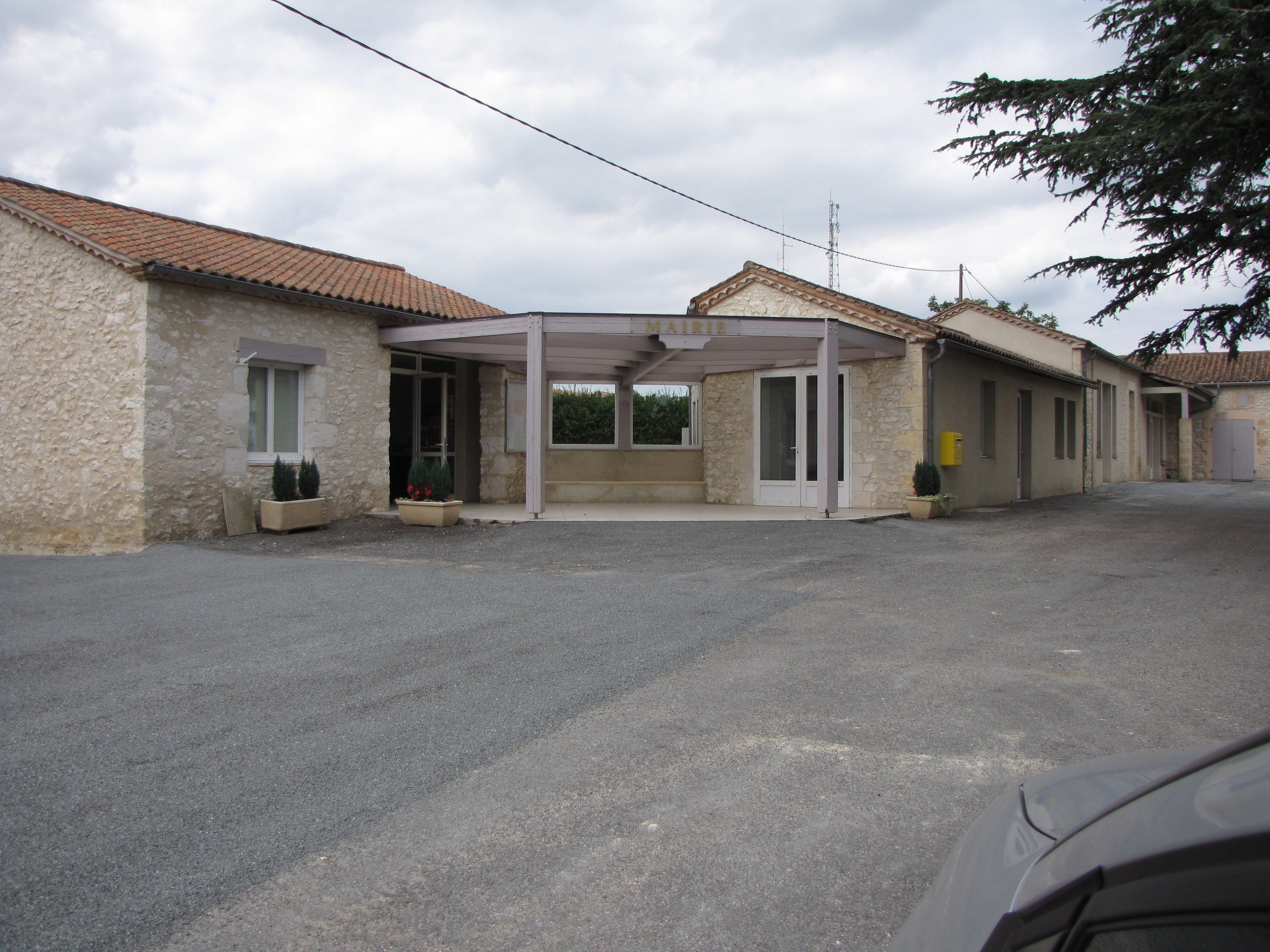 Mairie de Monségur (Lot-et-Garonne)